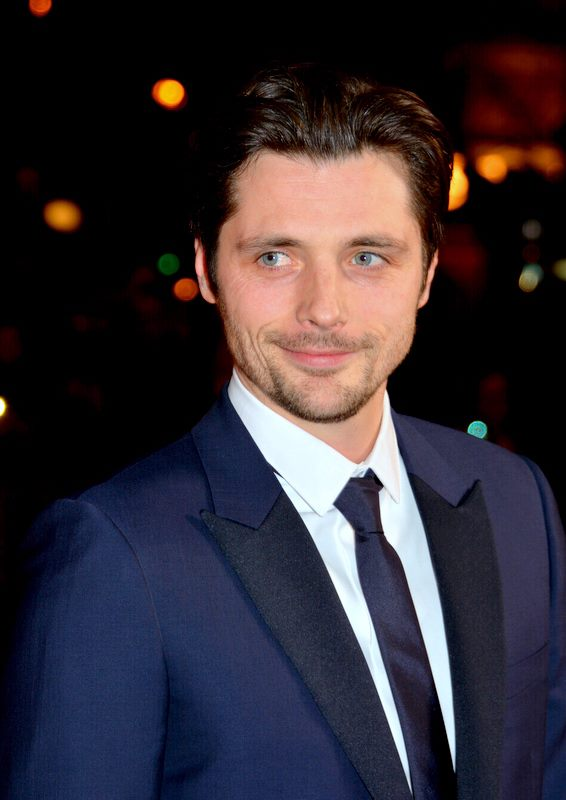 Raphaël Personnaz à la cérémonie des César